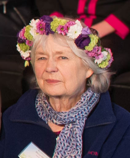 Mona Malm som en av Sommarpratarna i P1 på presskonferensen i Radiohusets trädgård den 3 juni 2015.